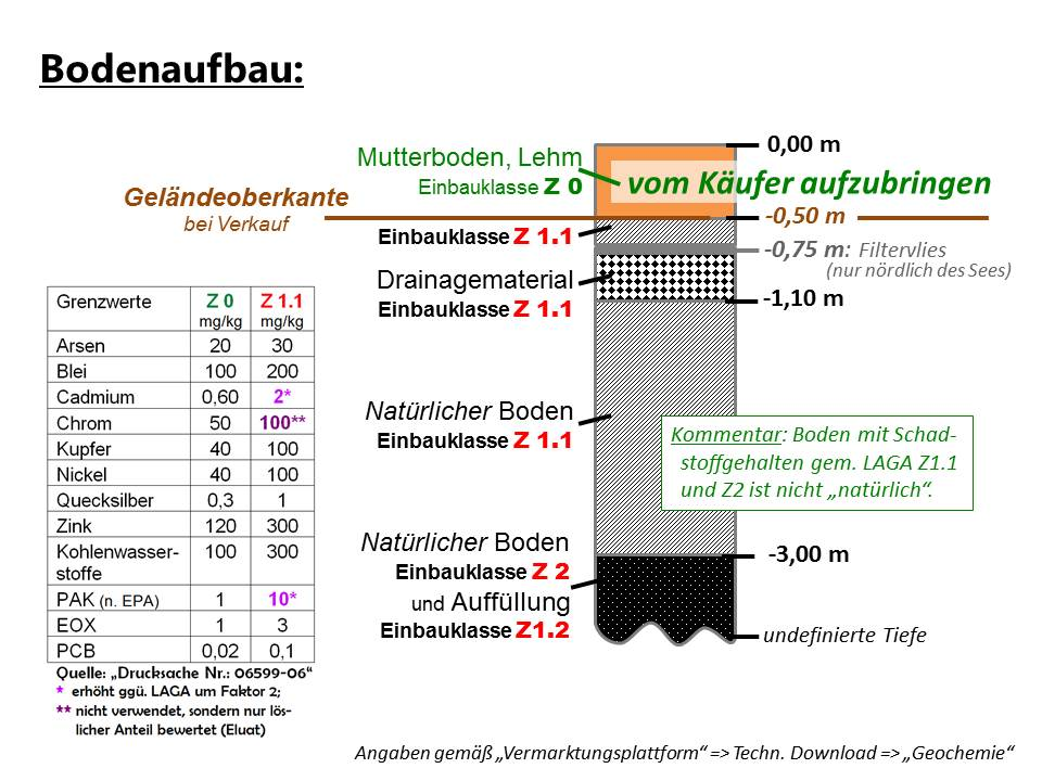 Phönixsee (Dortmund): Schadstoffgehalte im Boden der Wohngebiete